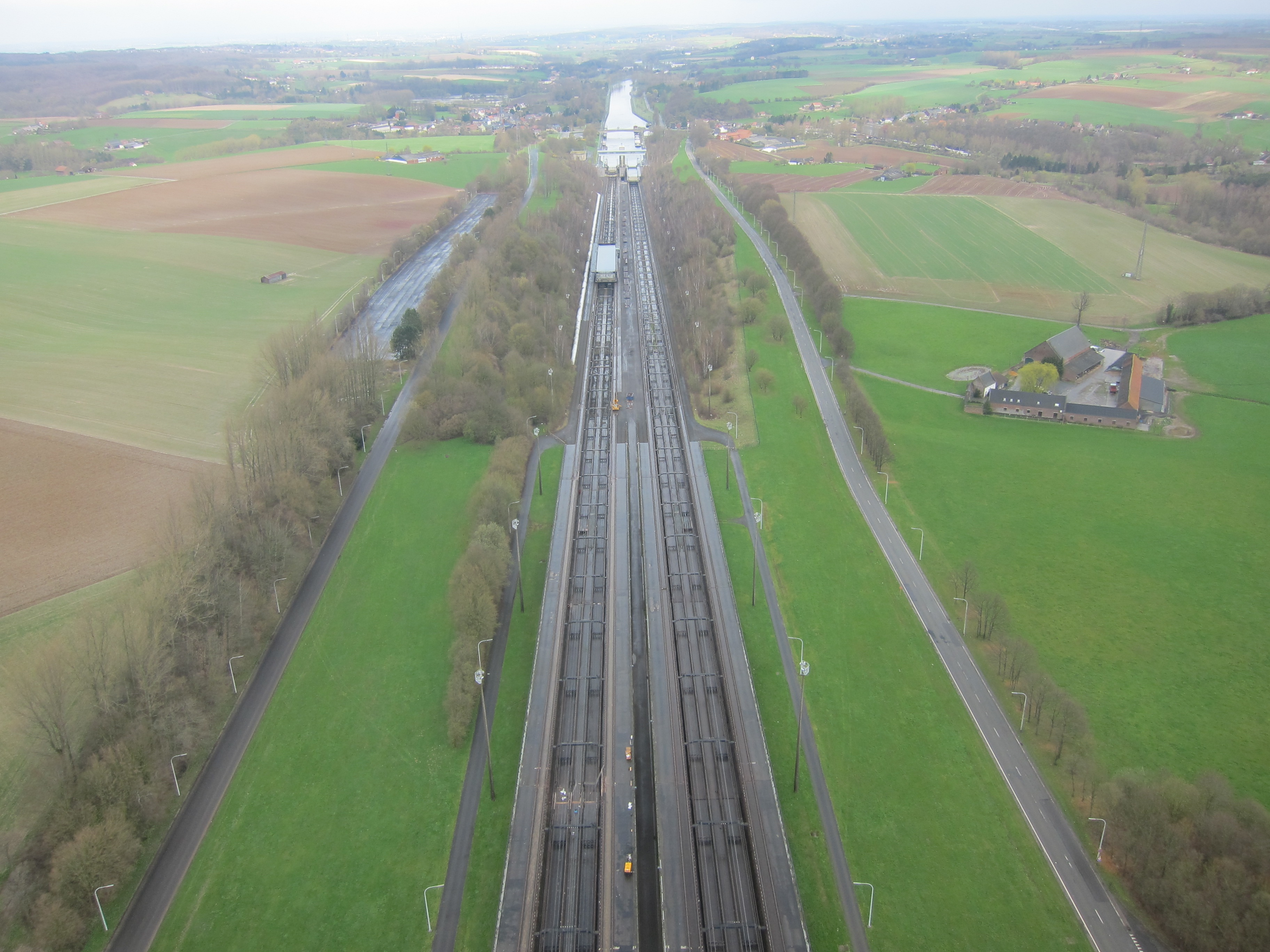 Plan Incliné de Ronquières